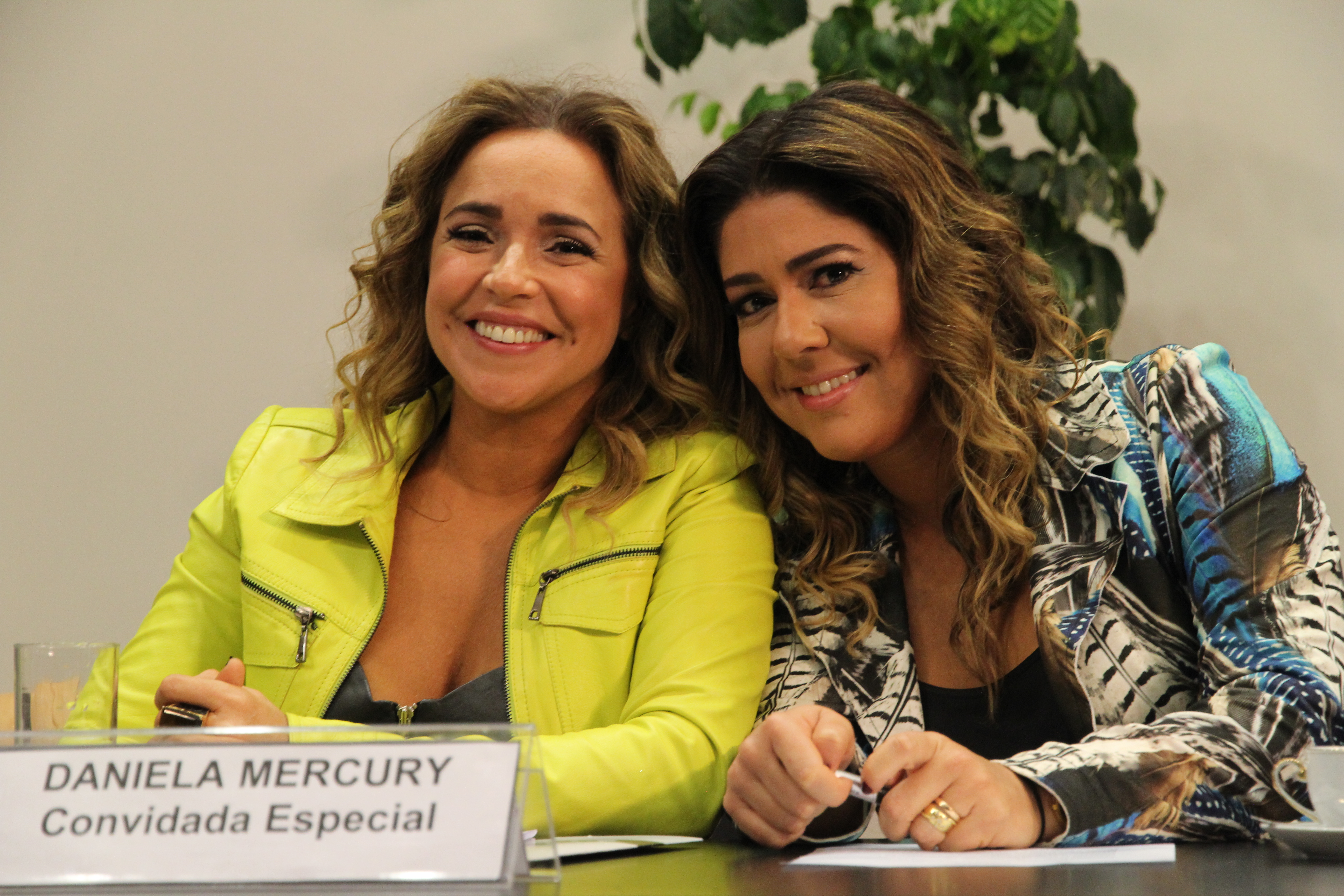 Tiago Zenero/PNUD Brasil